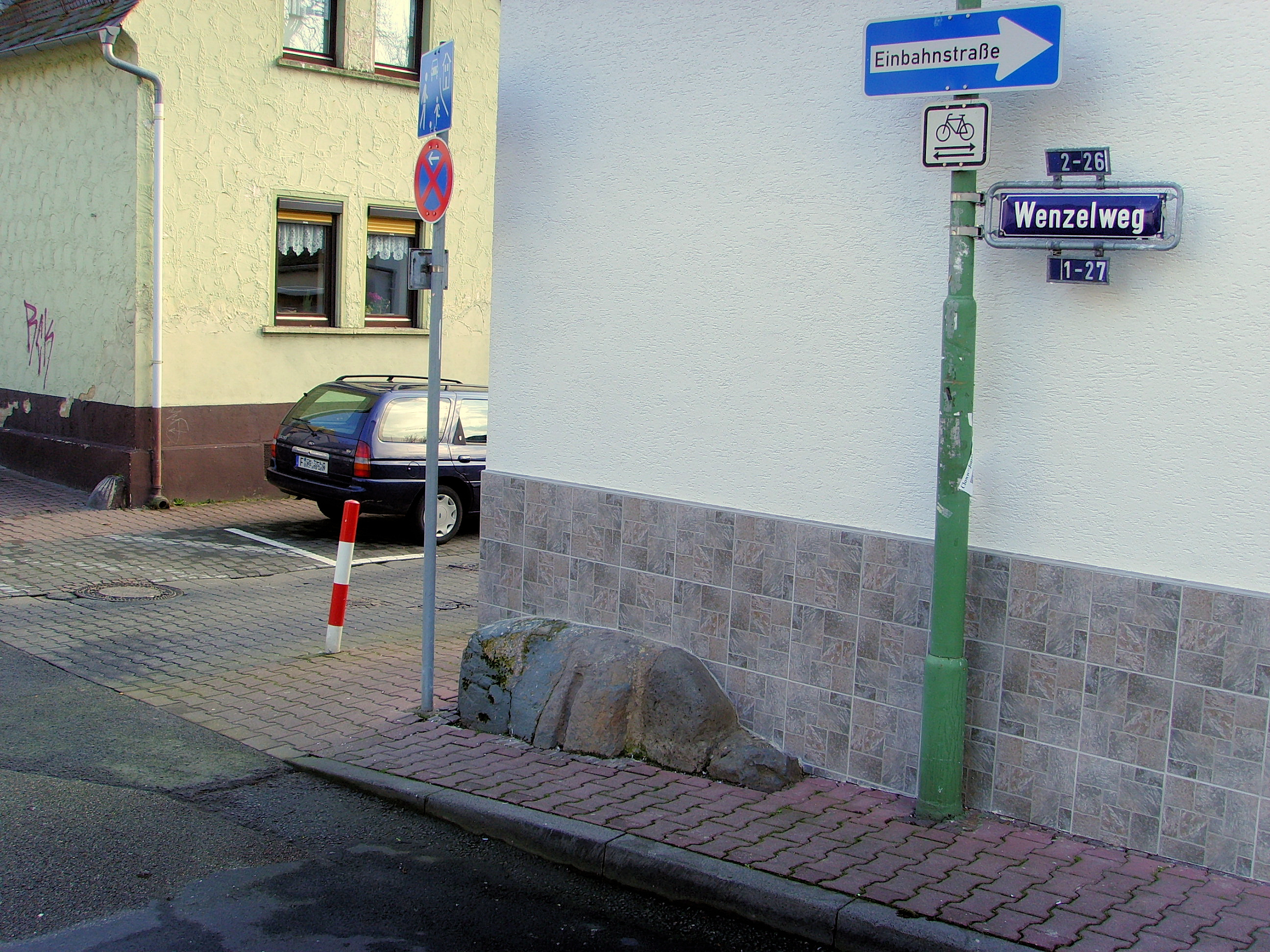 Eckhaus Frankfurt am Main-Heddernheim, Wenzelweg / Ecke In der Römerstadt this photo was taken by User:Gerbil from de.Wikipedia in march 2007 Am Grund des Hauses ist eine römische Türschwelle aus der antiken römischen Siedlung Nida (ca. 83 – ca. 260) eingemauert. Der Stein wurde gegenüber seiner ursprünglichen Lange in römischer Zeit um 90 Grad gekippt und diente an seinem neuen Ort als Abstandshalter zum Schutz des Eckhauses vor zu eng abbiegenden Pferdewagen. At the side of the pavement: a Roman threshold from the ancient Roman city "Nida" (today: Frankfurt am Main-Heddernheim), in early 19th century 'recycled' as a spacer to protect the quoin against horse coaches